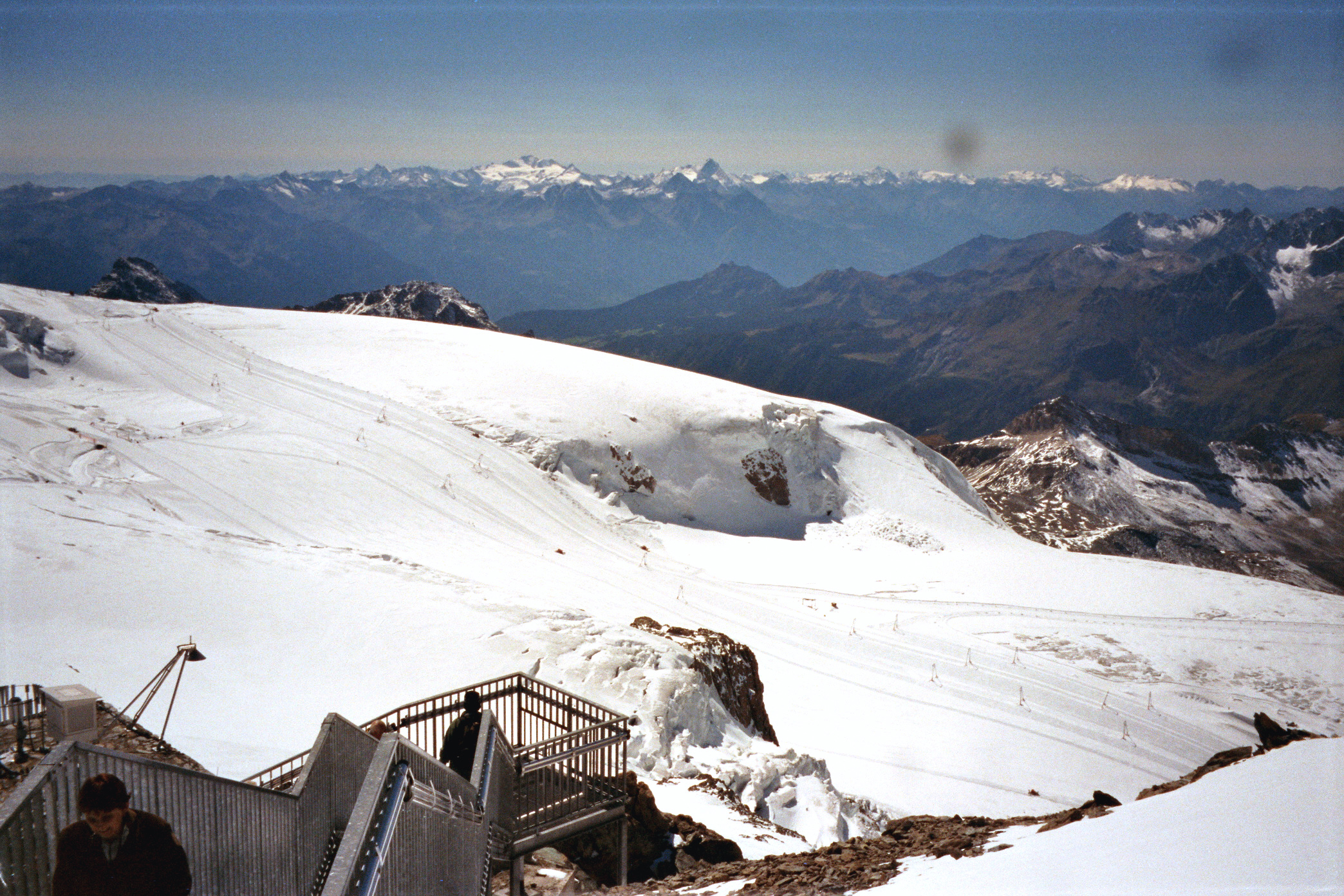 Plattform auf dem Gipfel des Klein Matterhorns mit Blick zum Theodulgletscher und Richtung Italien